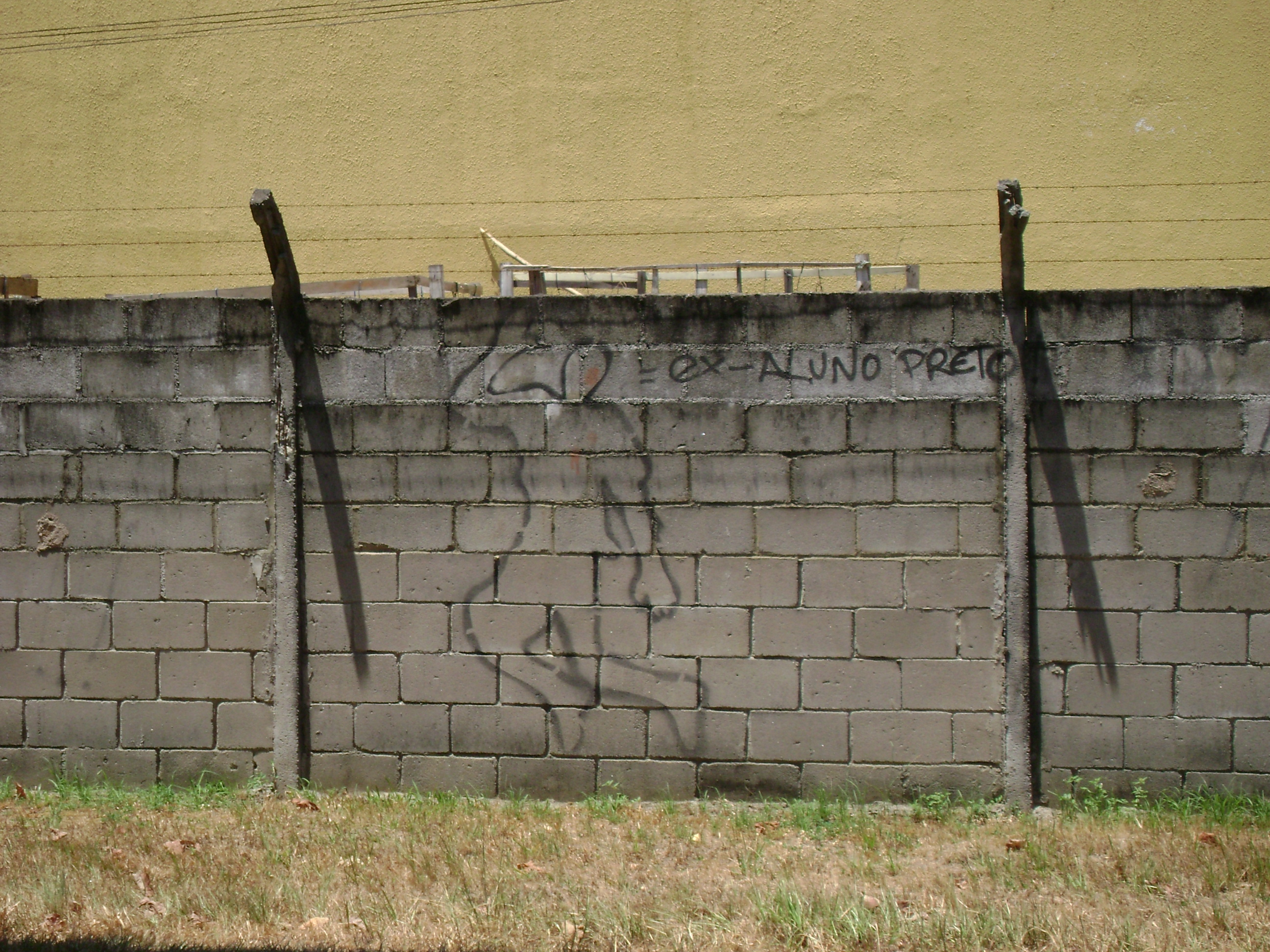 Inscrição de Ex-Aluno Preto em parede da Universidade Federal Fluminense campus Gragoatá, em Niterói, Rio de Janeiro, Brasil.